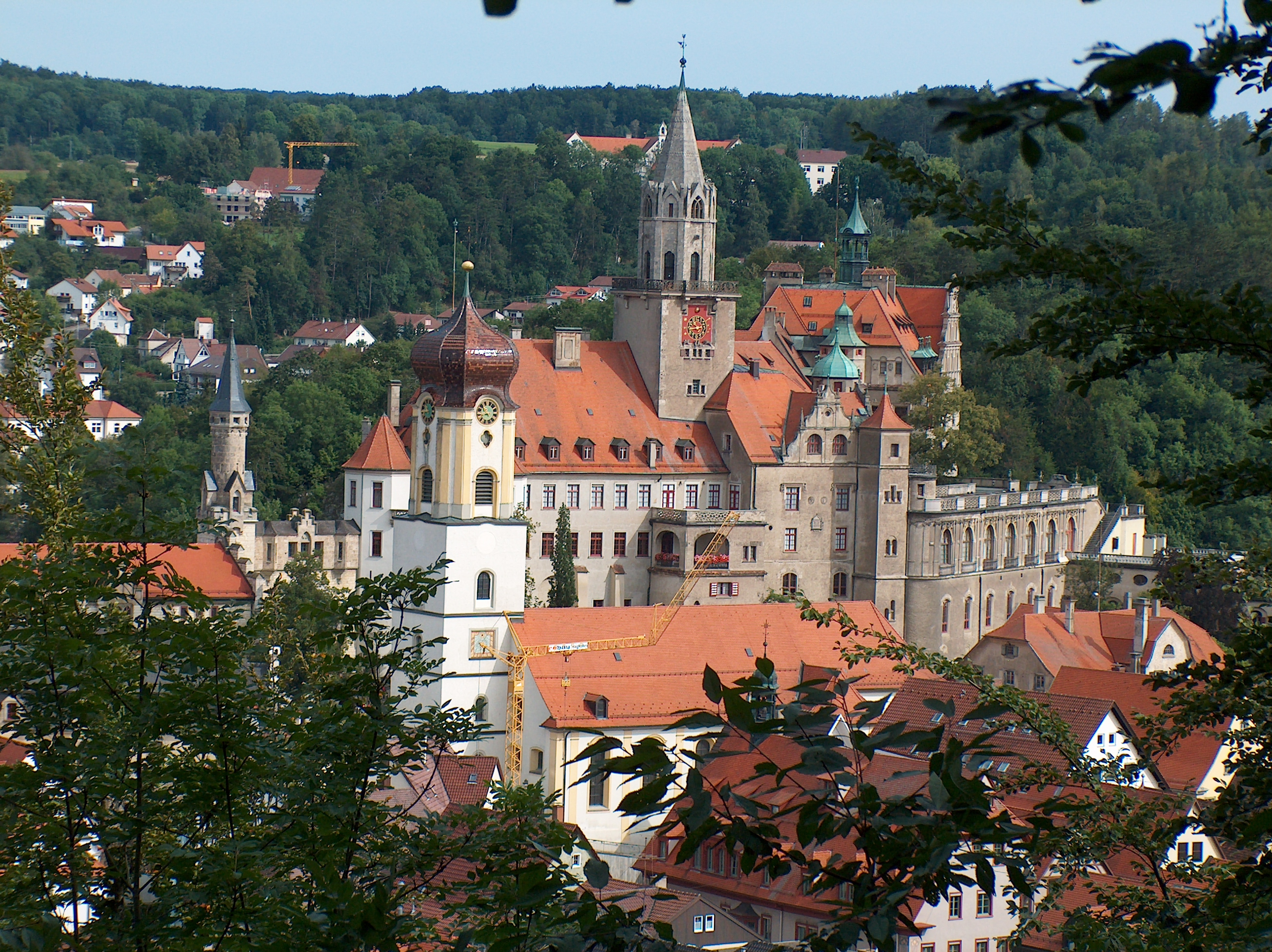 Die Südseite des Hohenzollernschlosses Sigmaringen